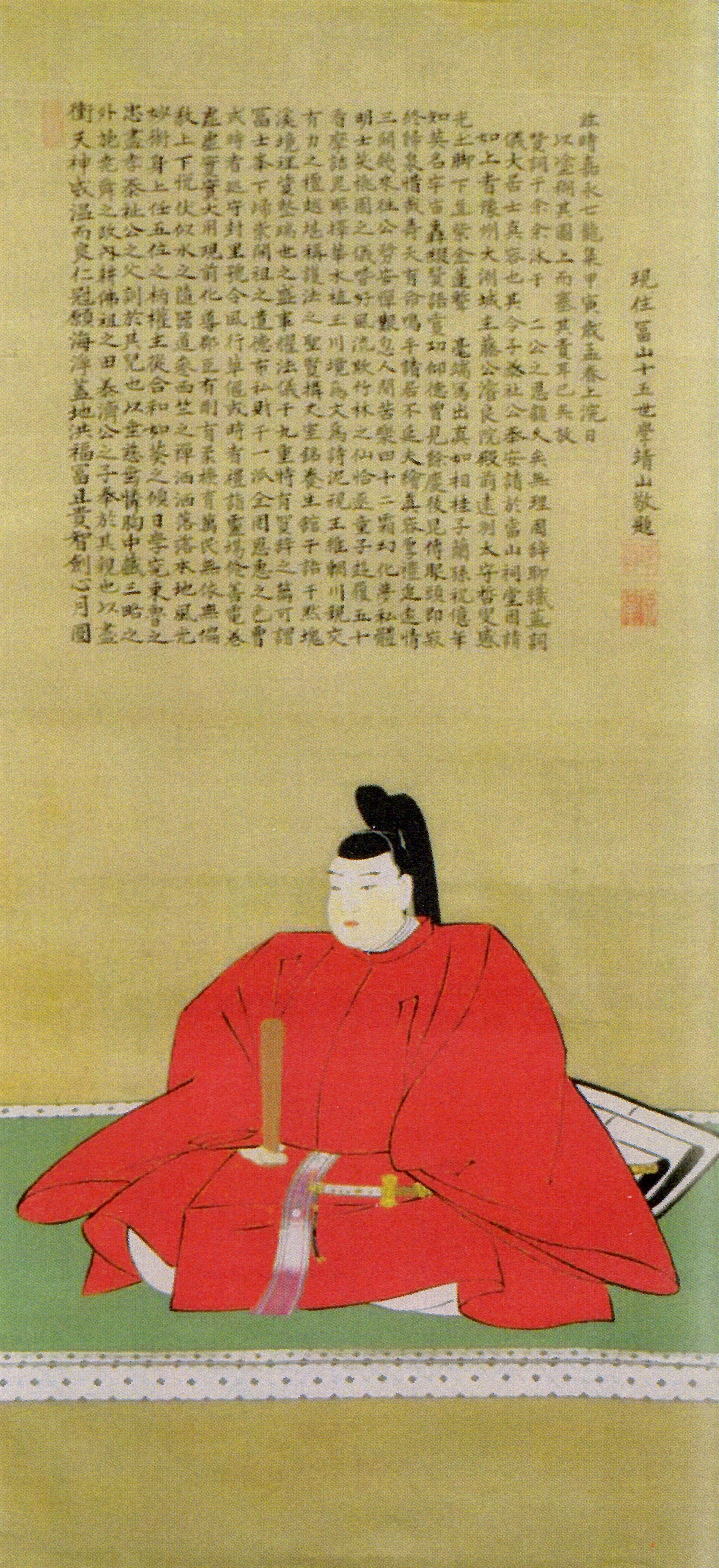 加藤泰幹の肖像。